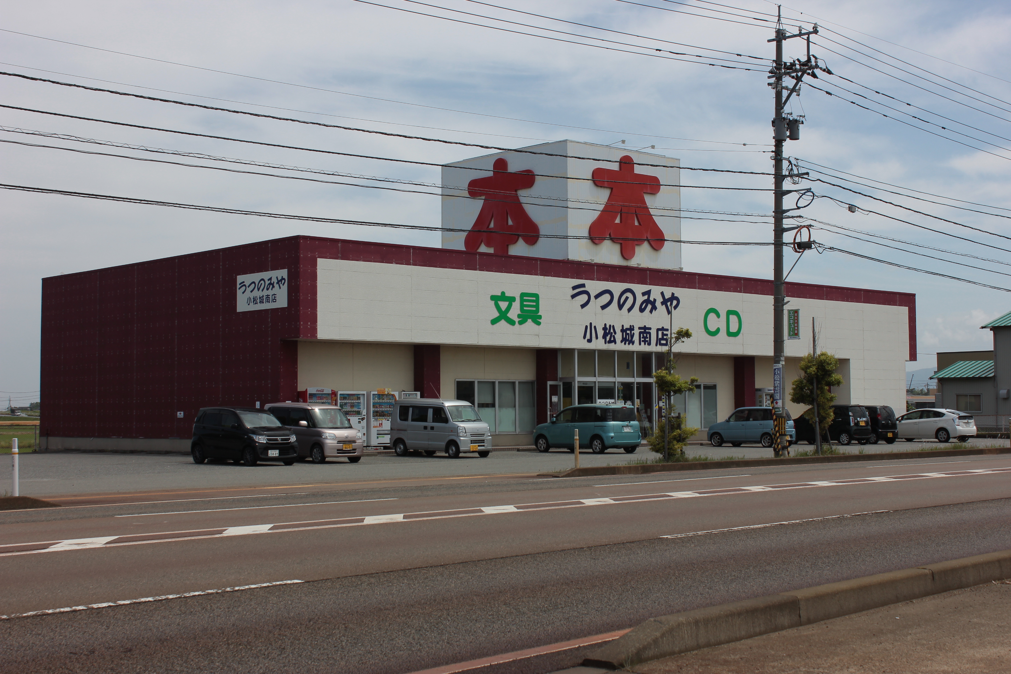 うつのみや小松城南店（石川県小松市） Canon EOS Kiss X5